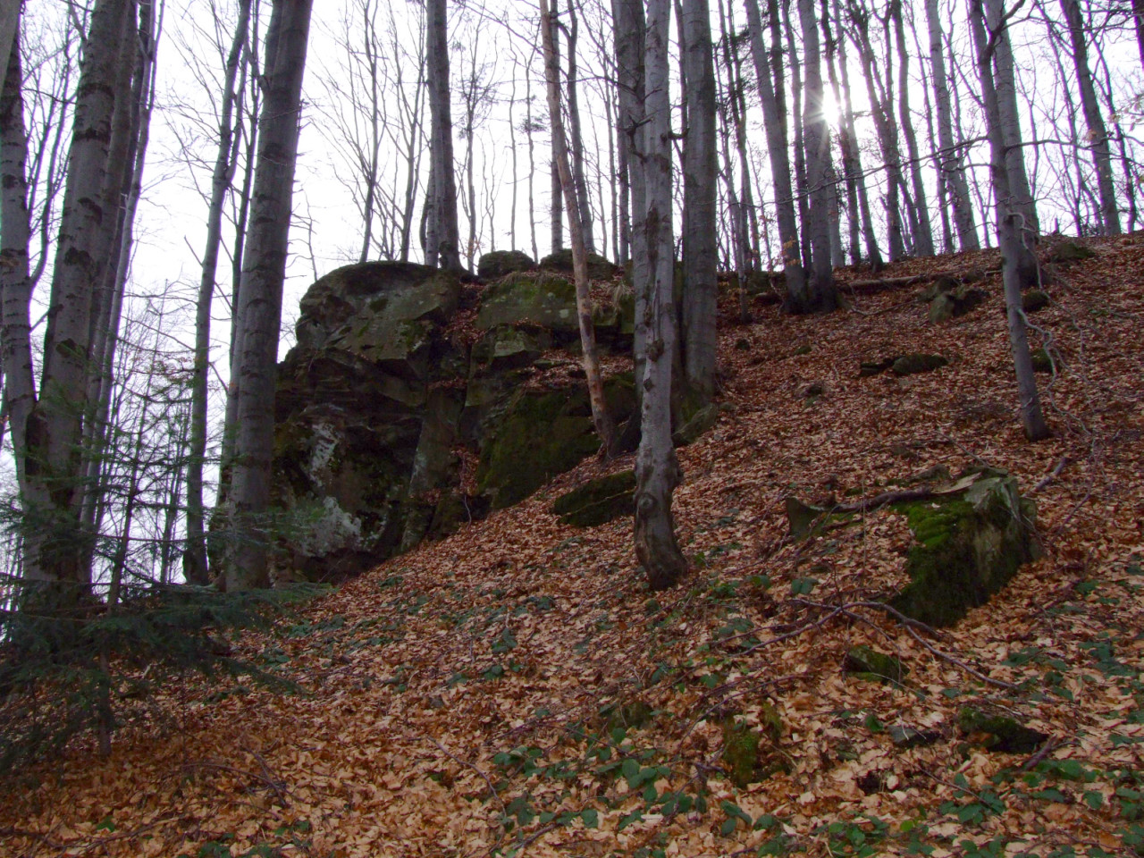 Wychodnie skalne na Szczeblu (Beskid Wyspowy)